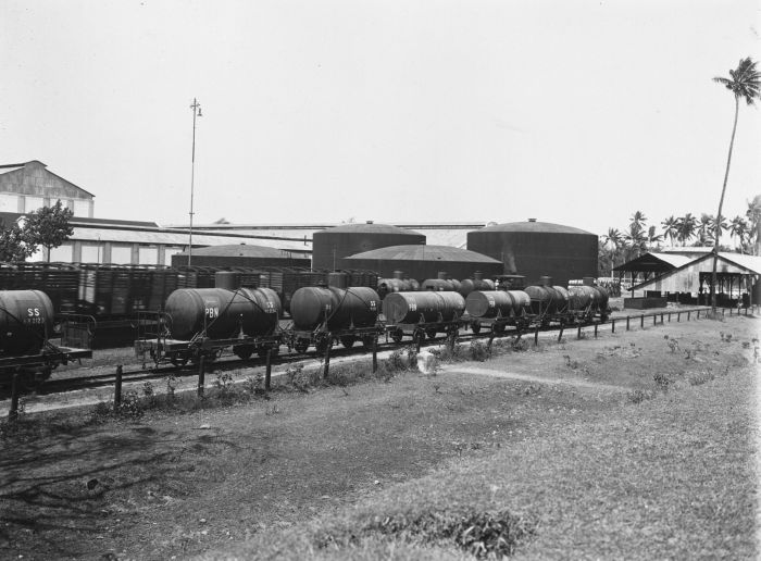 Foto. Overslagstation voor melasse behorende bij spiritusfabriek Wates [?], Java